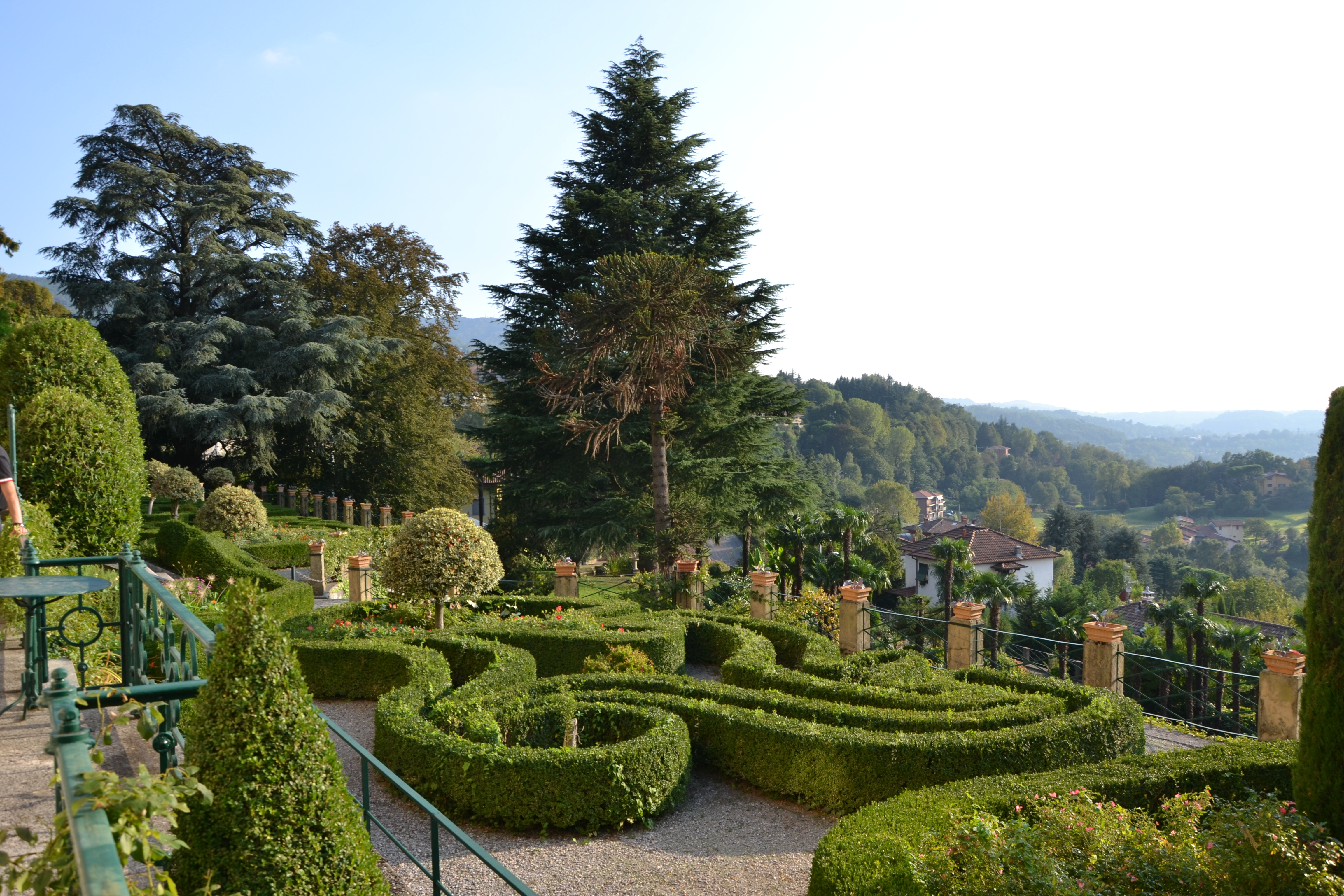 Villa Bertarelli. ubicata in comune di Galbiate, ospita la sede del Parco Monte Barro